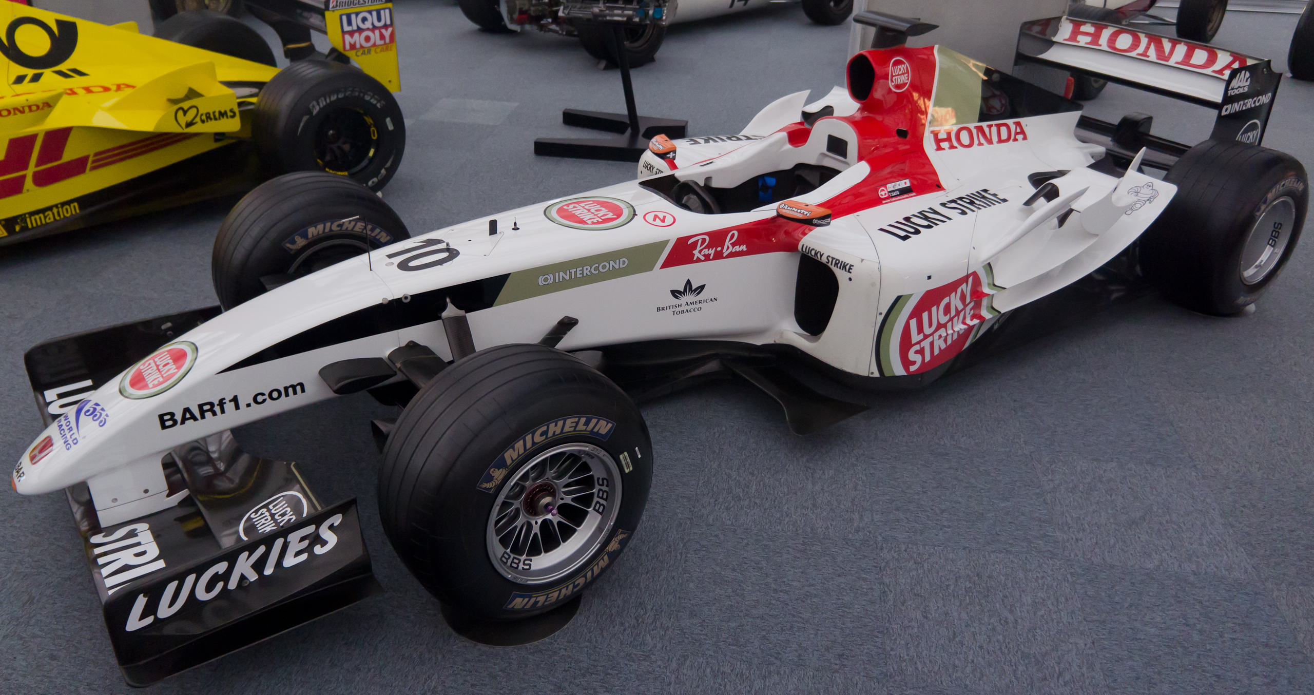 BAR 006 (#10 Takuma Sato)